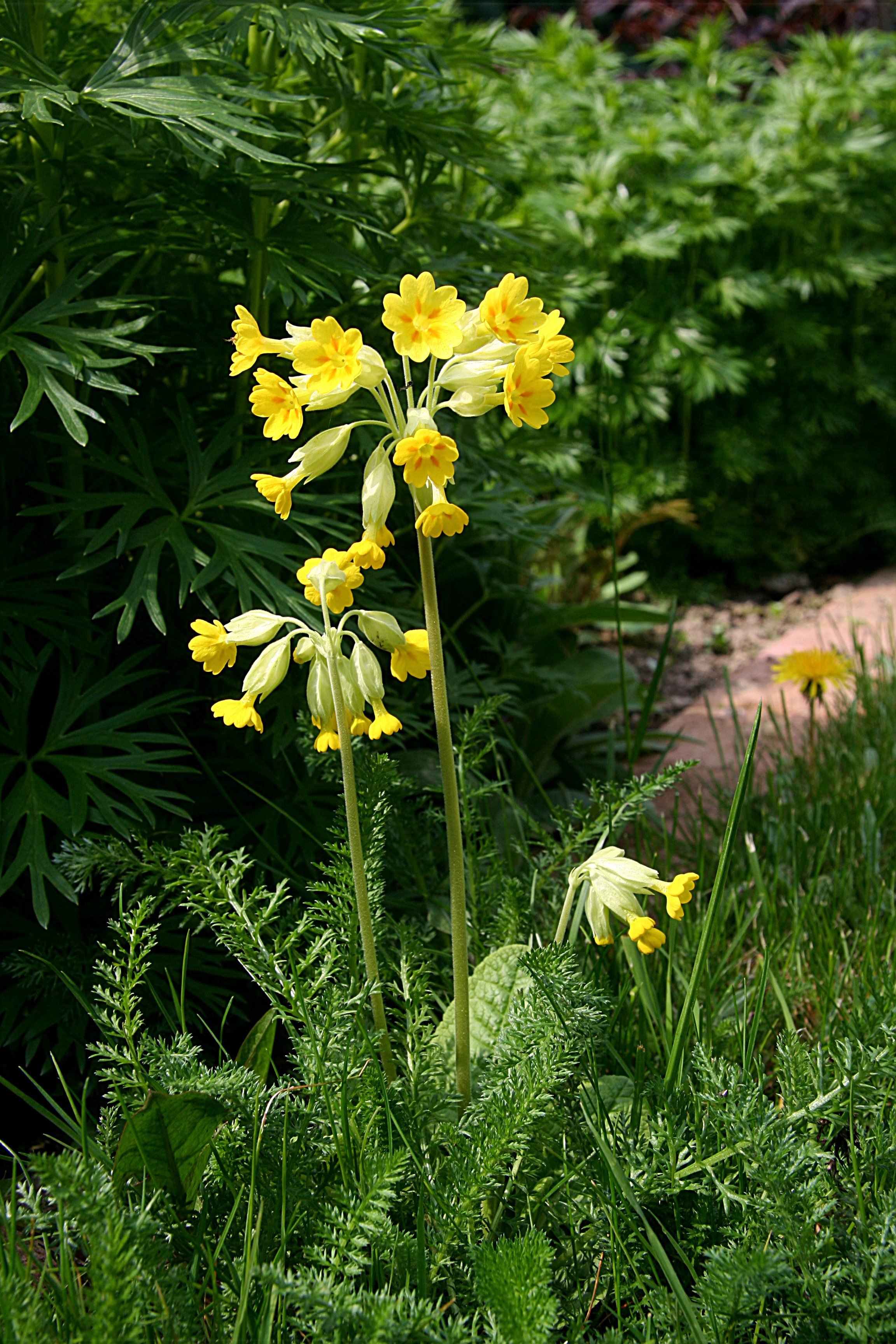 Schlüsselblume oder Primula veris